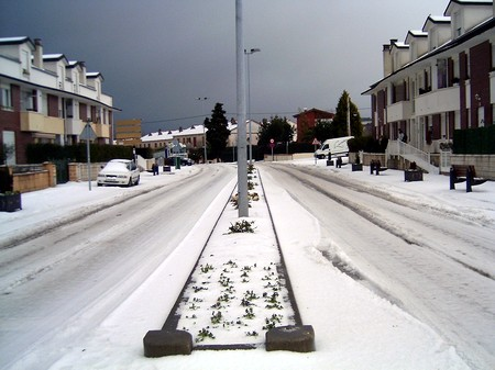 Tanos (Cantabria, España) Fotografia tomada por mi en marzo del 2004